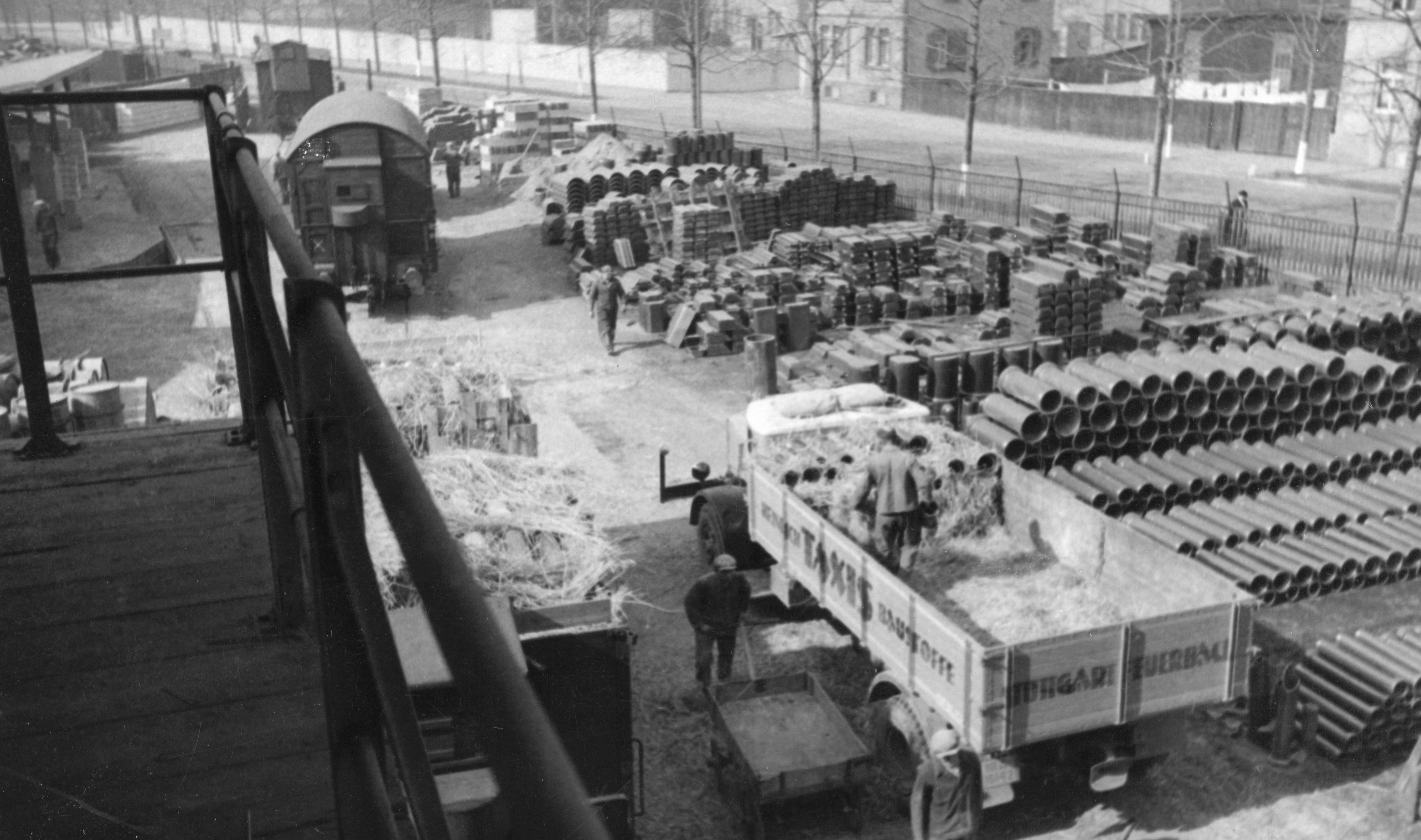 Außenlager mit Ton-Rohren der Heinrich Taxis GmbH + Co. KG in den 1920er Jahren. Zu sehen ist auch die Gleisanbindung und der Transport (mit Stroh gepolstert).